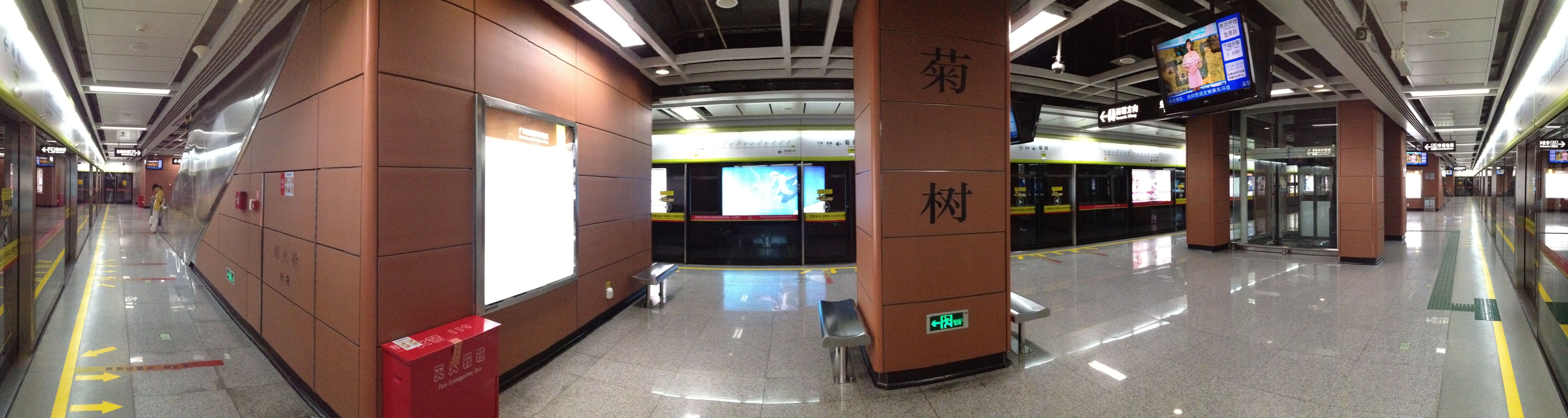 广州地铁菊树站月台全景图